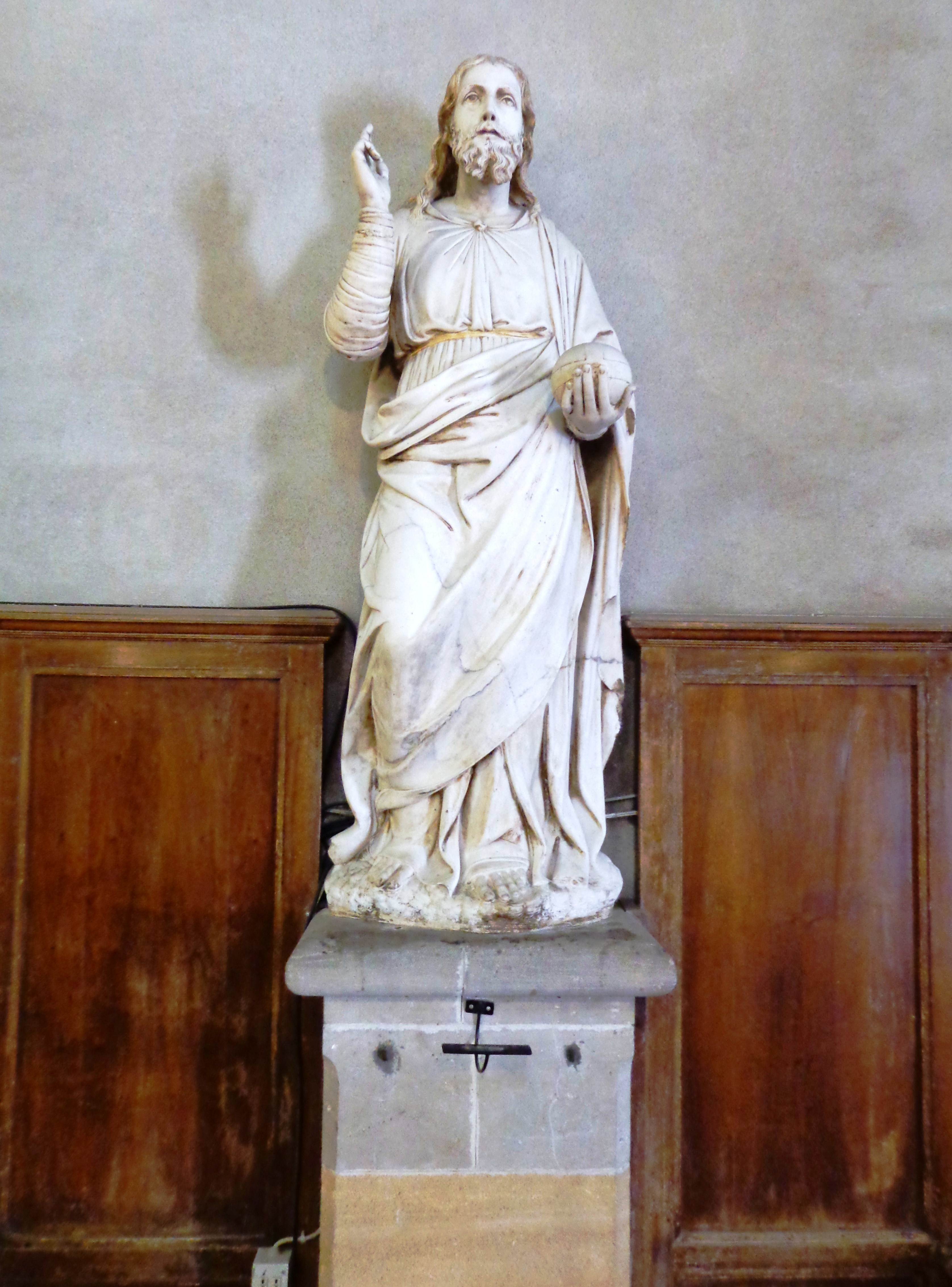 Chiesa_Cancelliere_03